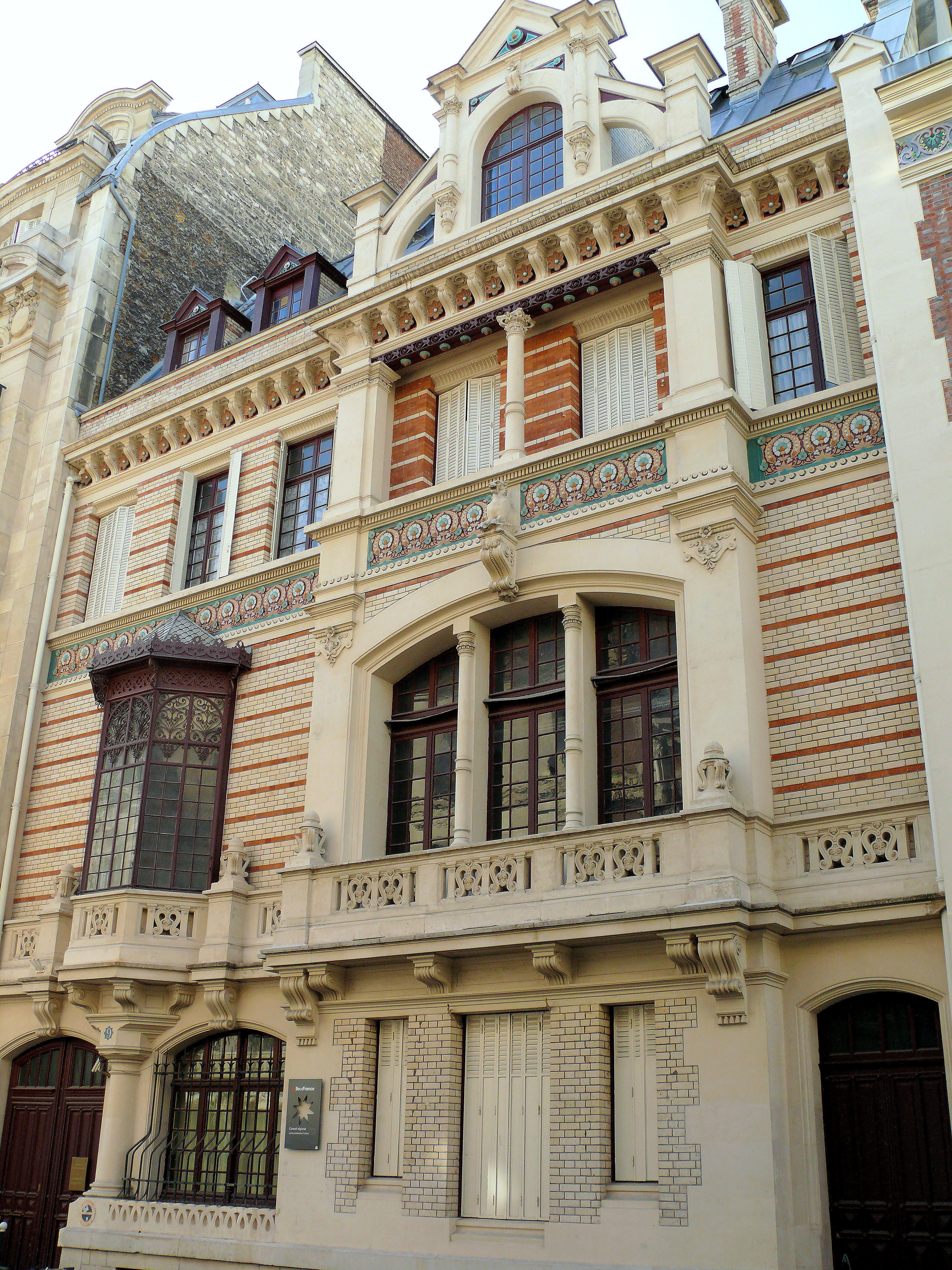 Paris 17ème arrondissement - Immeuble 9 rue Fortuny